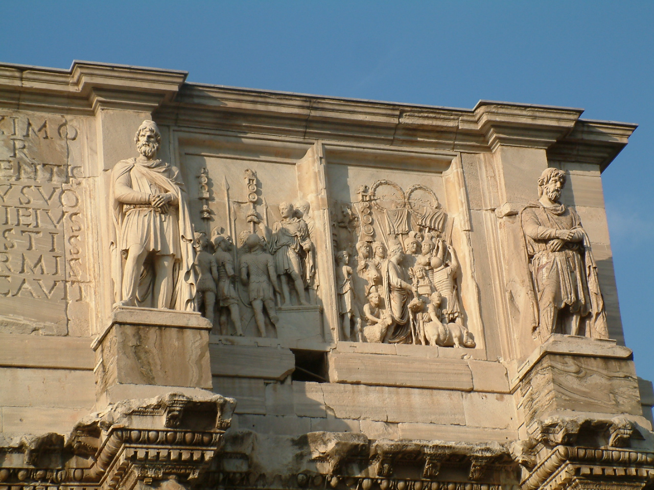 Arco di Costantino a Roma. Dettaglio.